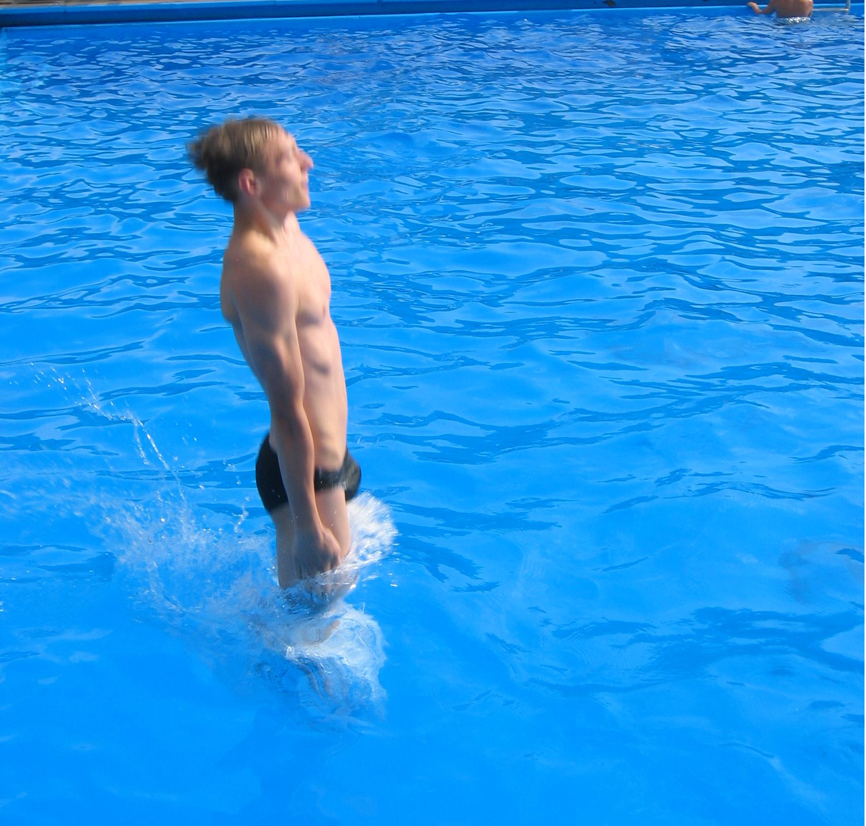 Ein Schwimmer beim Fußsprung